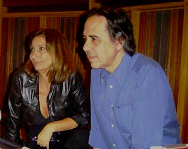 Os cantores brasileiros Zizi Possi e Edu Lobo na Sala Funarte.